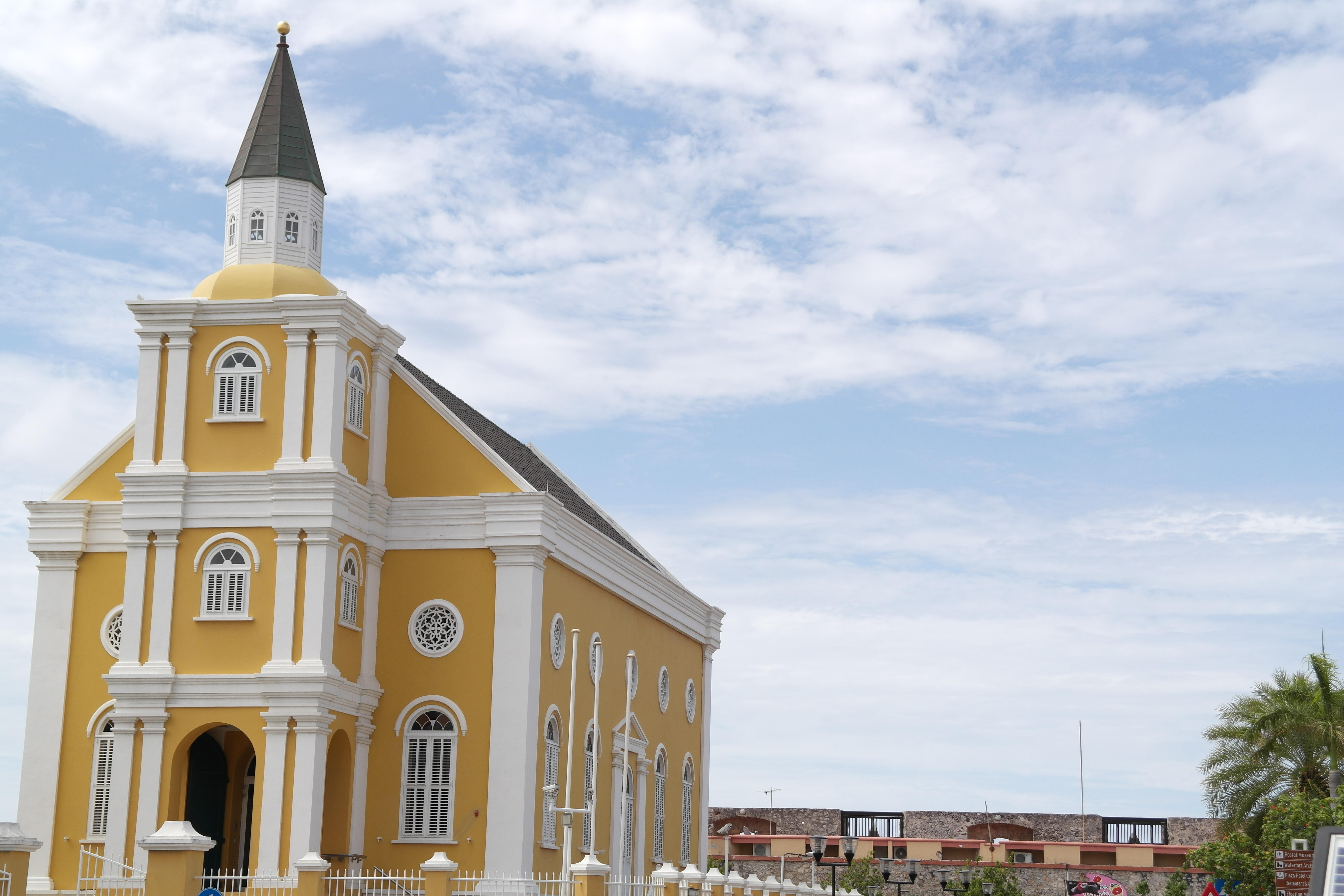 De Tempel Emanuel, Willemstad, Curaçao